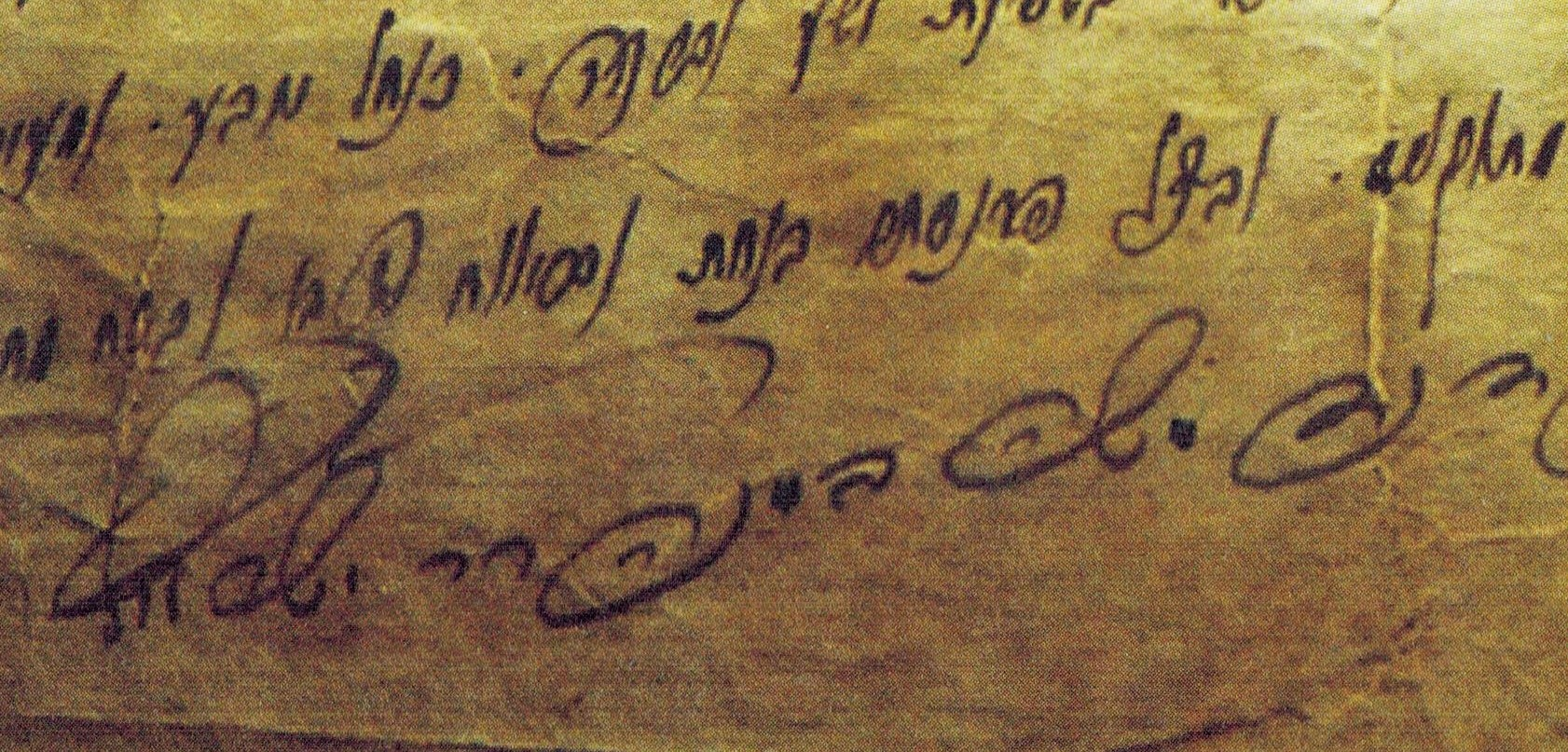 צילום כתי"ק של הרב דוד משה פרידמן מטשורטקוב